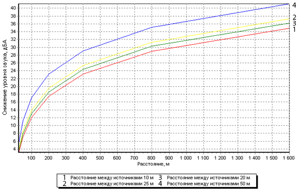 Абсолютно намаление на нивото на звука от източник с крайна дължина при различни разстояния между единичните източници и при постоянен брой на източниците n=20.